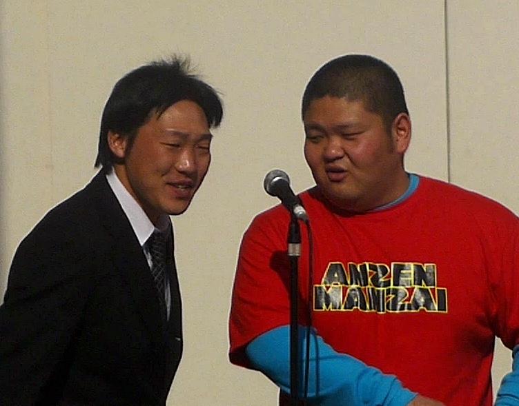 ANZEN漫才 (Anzen Manzai)